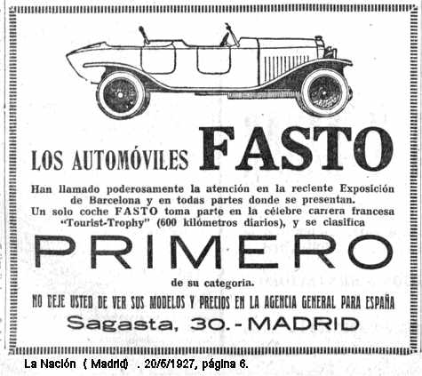 Los automoviles Fasto primeras en su categoria